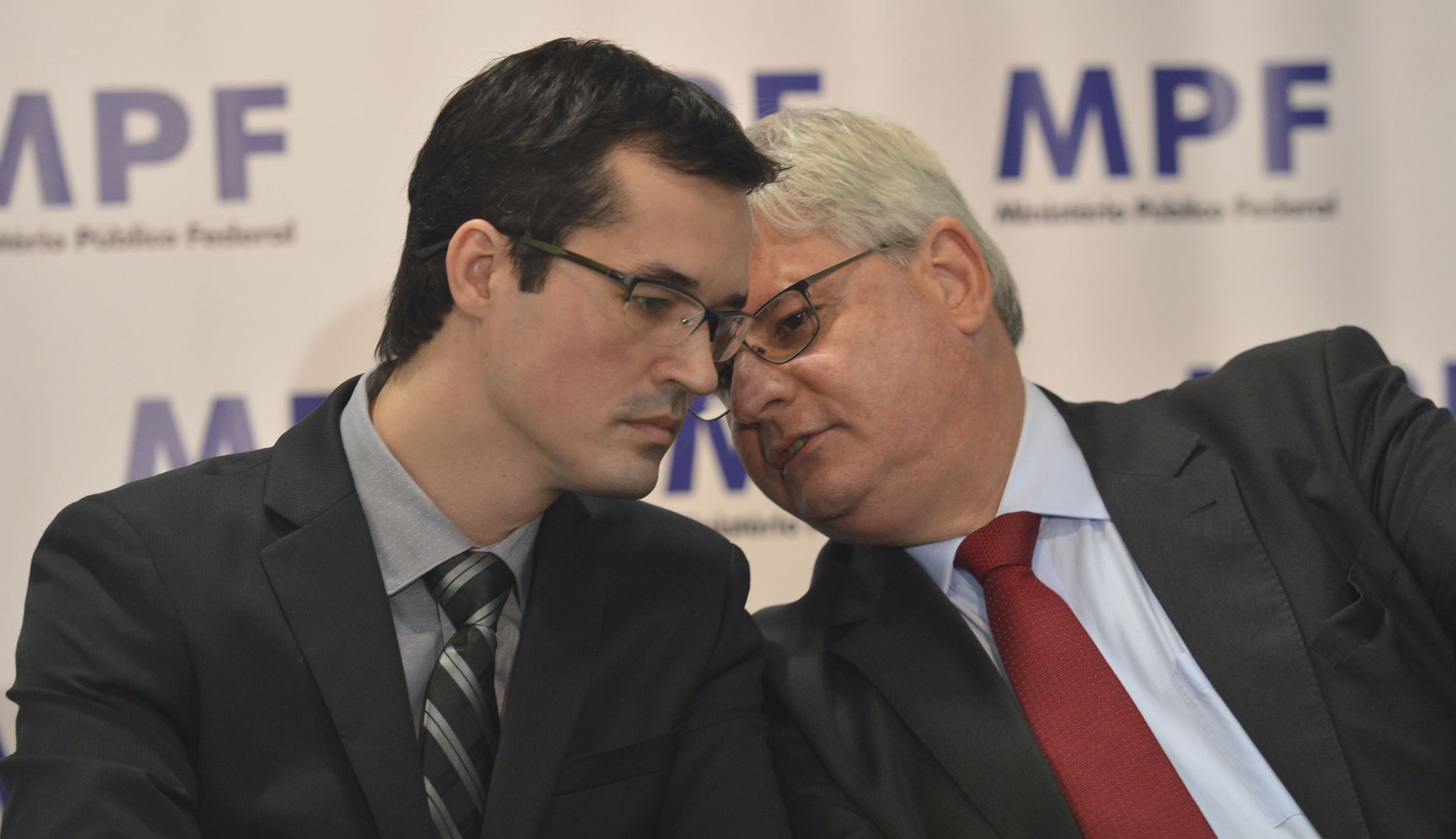 Deltan Dallagnol, coordenador da Operação e o procurador Rodrigo Janot, na cerimônia de devolução a Petrobras de valores recuperados pela Operação Lava Jato.